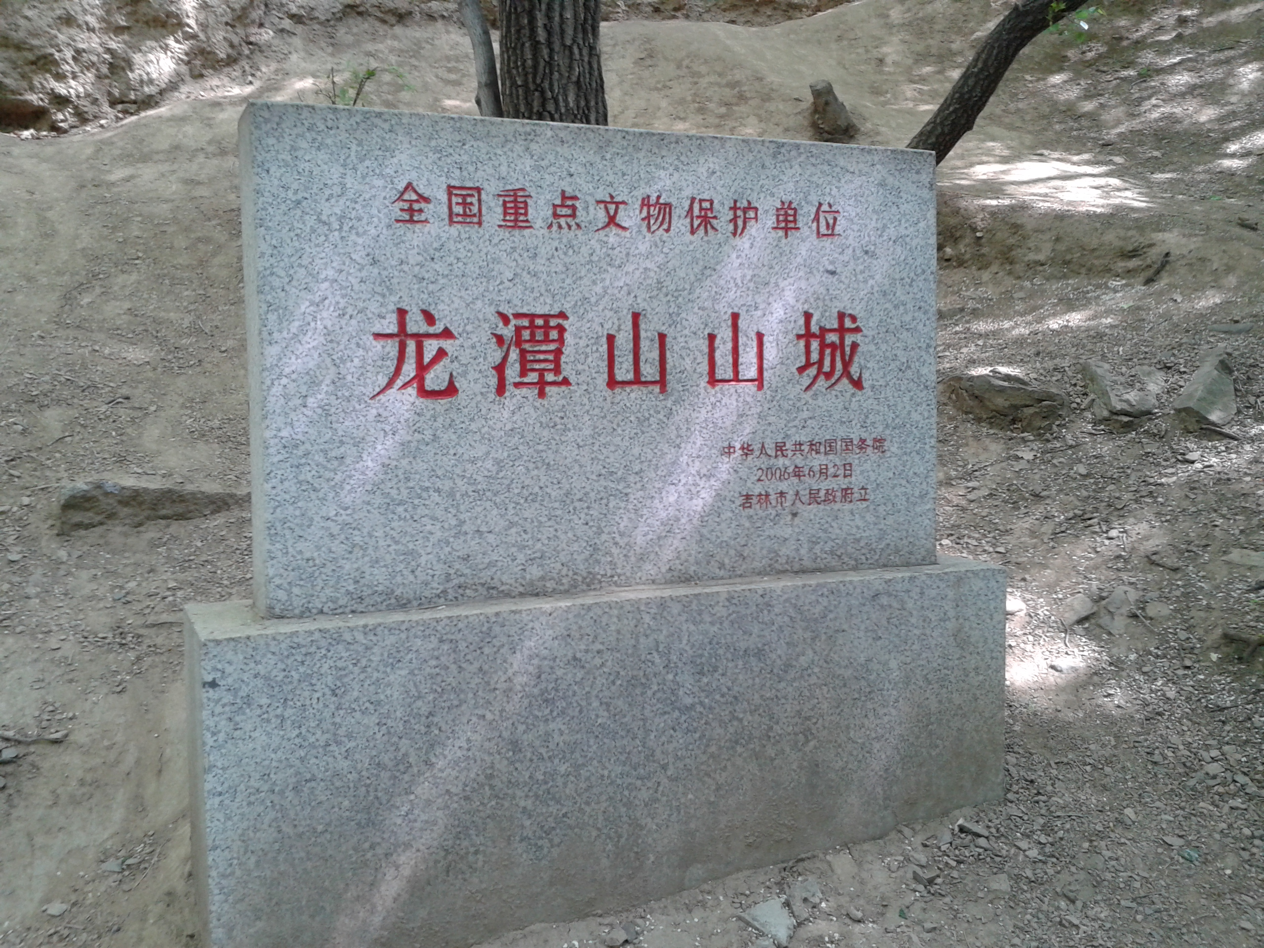 龙潭山山城